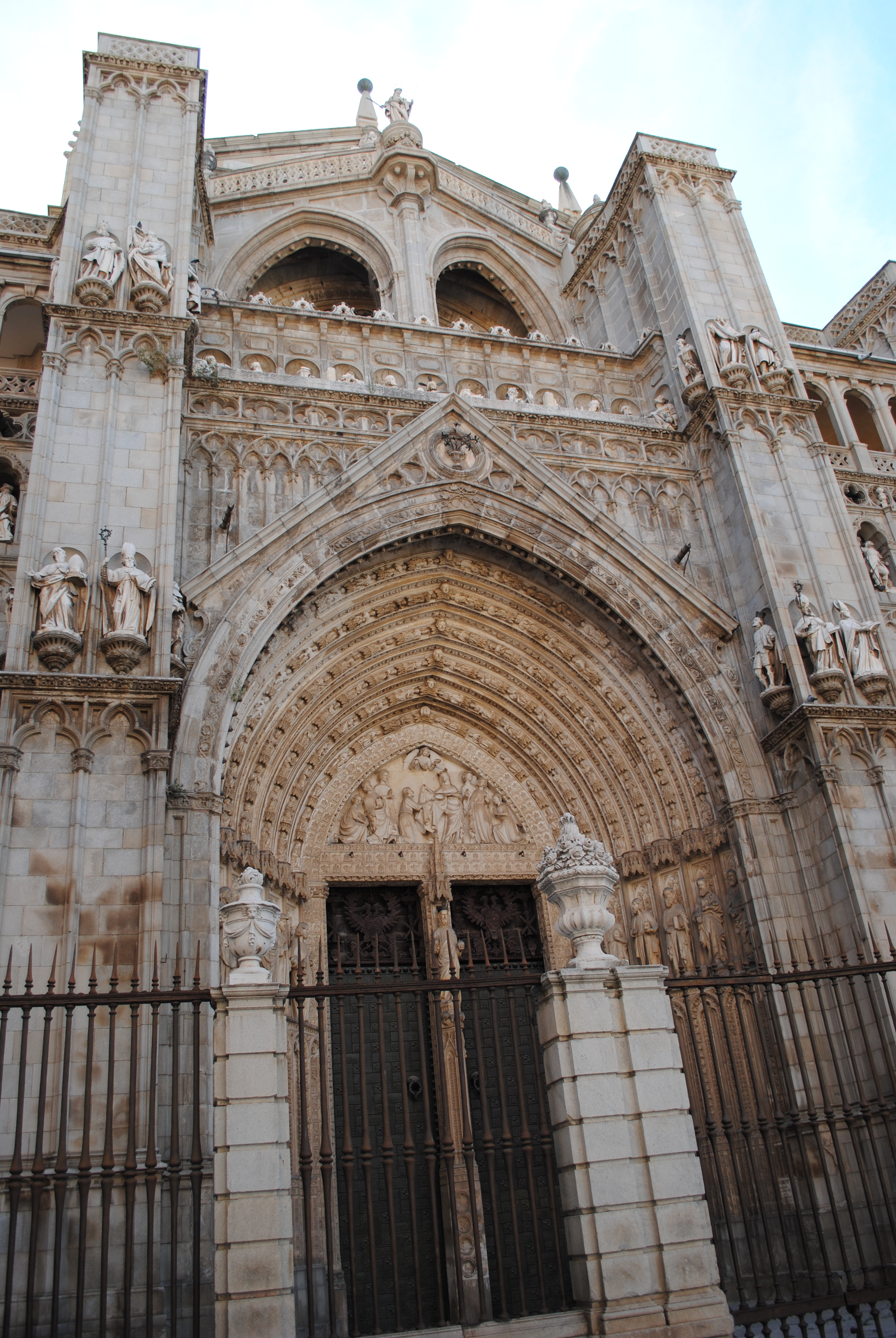 Puerta de los Leones de la Catedral de Santa María de Toledo